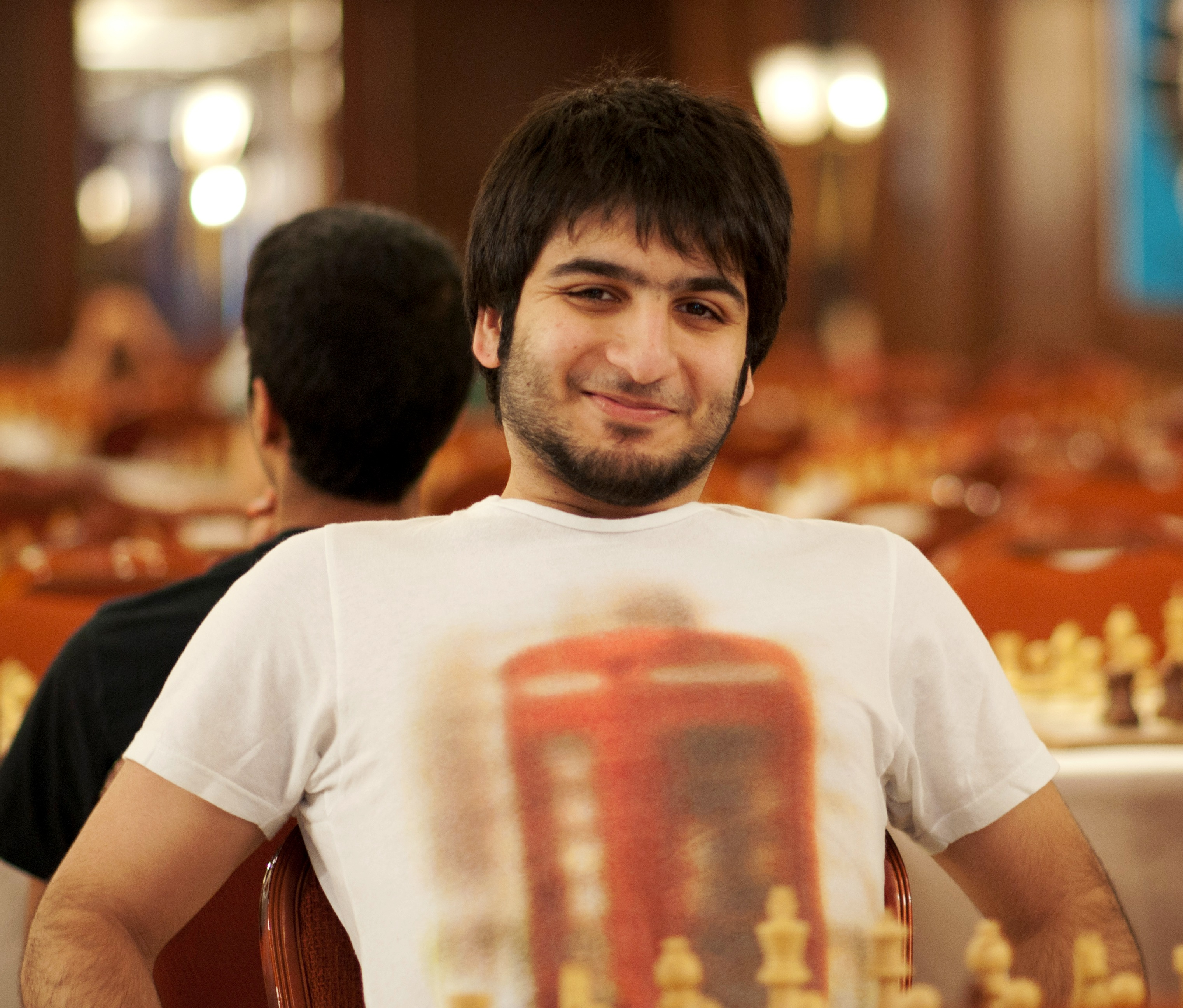 GM Salem A R Saleh, , WChJ Athens 2012